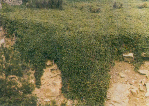 Manto de Gayuba Tapizado de Gayuba, Torrecuadrada de los Valles (Guadalajara, España)